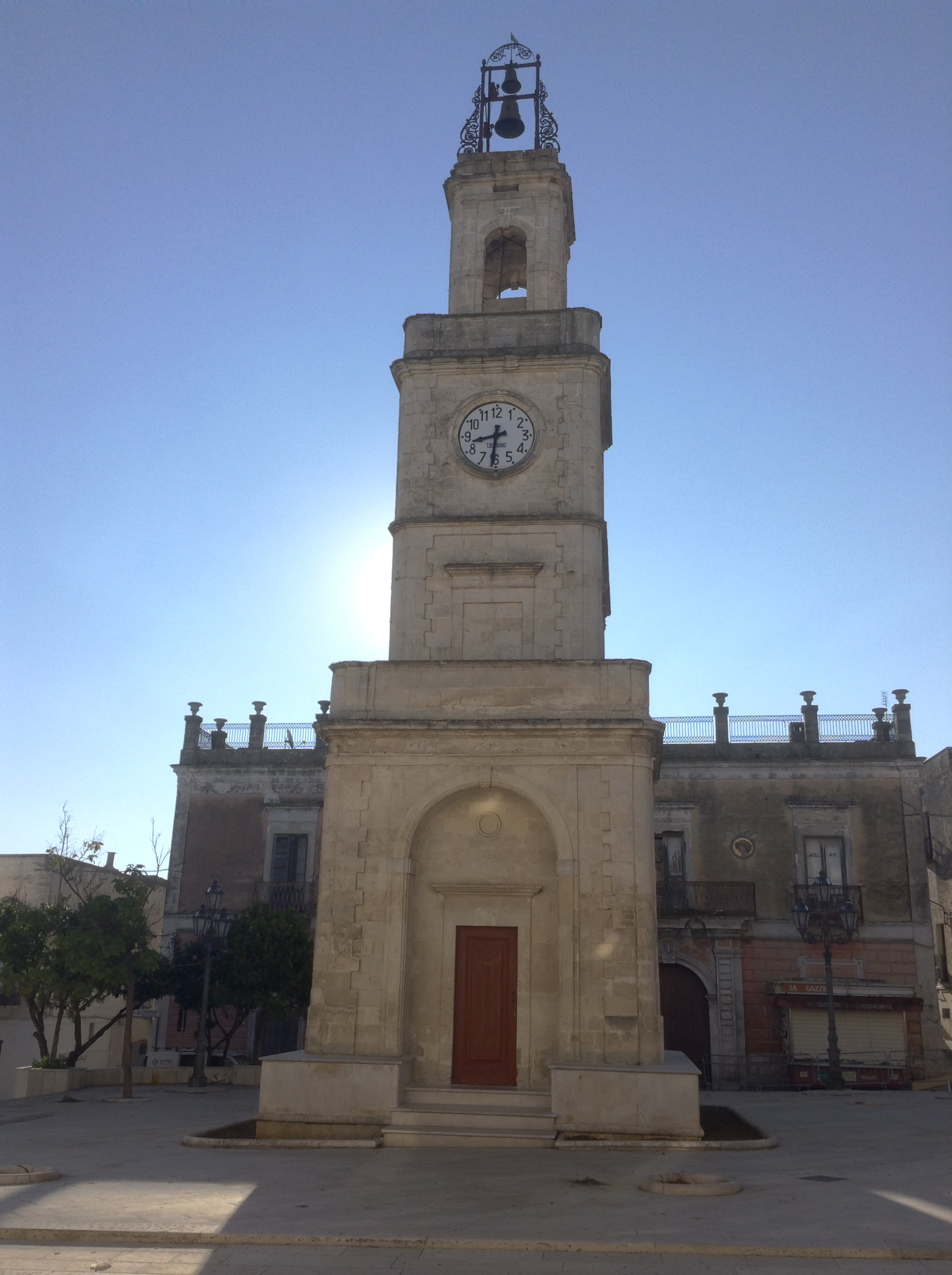 Torre dell'orologio a Ginosa, costruito tra gennaio e maggio del 1820. La spesa fu di ducati 275,58